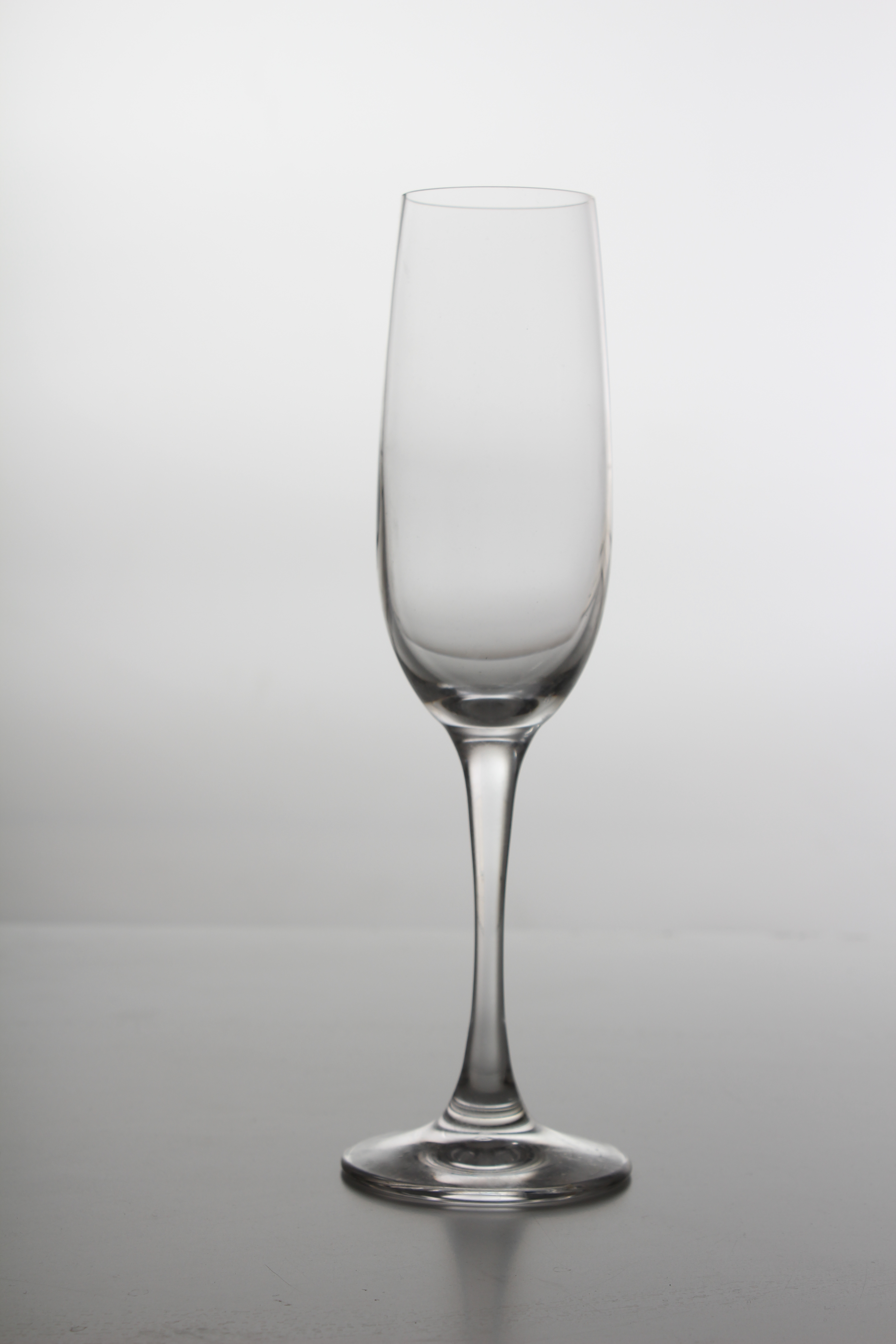 צילום שקוף של כוס זכוכית. צילום שקוף הוא צילום בעייתי צריך תאורת פלאשים שתדגיש את קווי המתאר של האובייקט